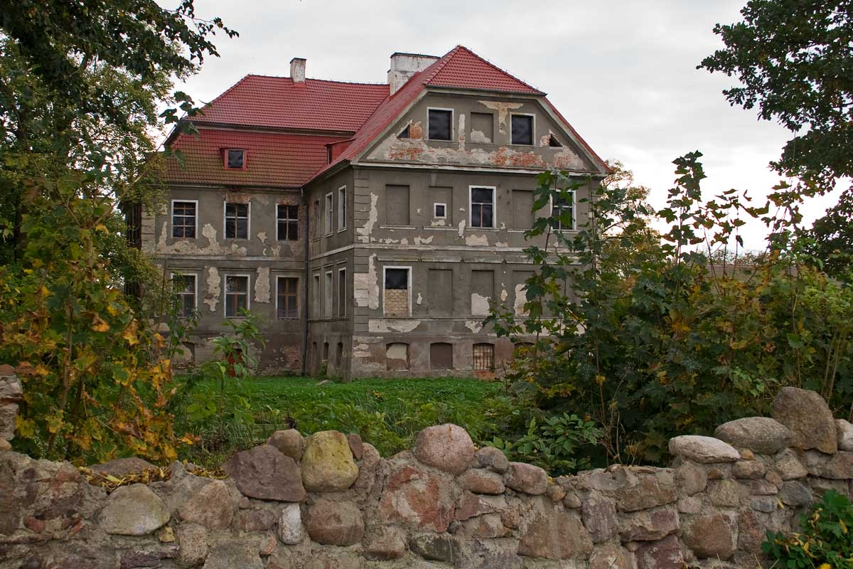 Chichy-pałac